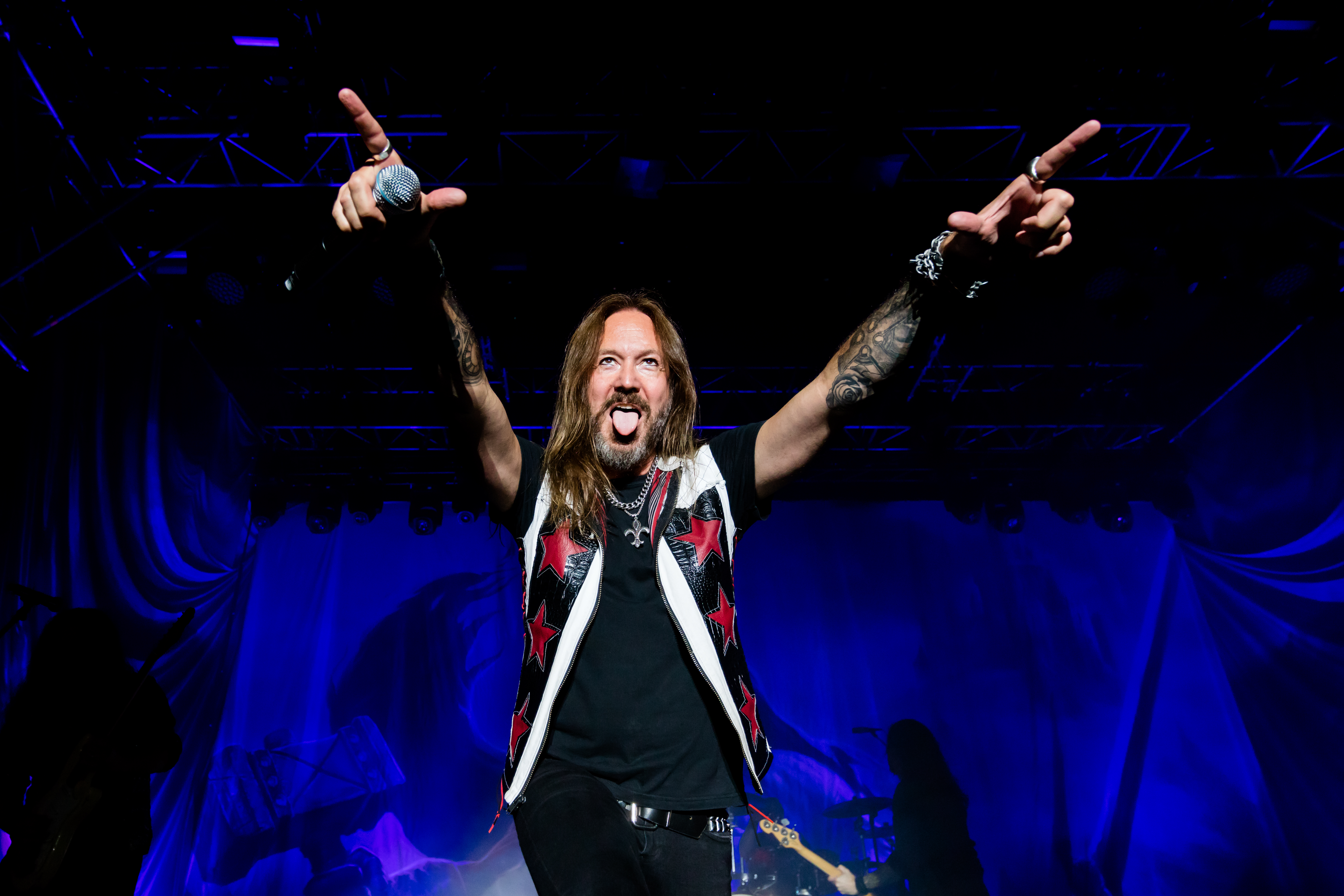 Hammerfall during Zeltfestival Rhein-Neckar at Maimarkt, Mannheim, Baden-Württemberg, Germany on 2017-06-24, Photo: Sven Mandel